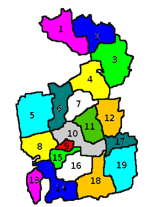 Gemeindegliederung Rajon Pjatychatky, Oblast Dnipropetrowsk, Ukraine 1:Trojizke 2:Bilenschtschyna 3:Lychiwka 4:Cholodijiwka 5:Schowte 6:Palmyriwka 7:Wynohradiwka 8:Bohdano-Nadeschdiwka 9:Pjatychatky 10:Sorja 11:Komissariwka 12:Losuwatka 13:Marjaniwka 14:Sawro 15:Iwaschyniwka 16:Hruschuwatka 17:Wyschnewe 18:Saksahan 19:Sajiwka